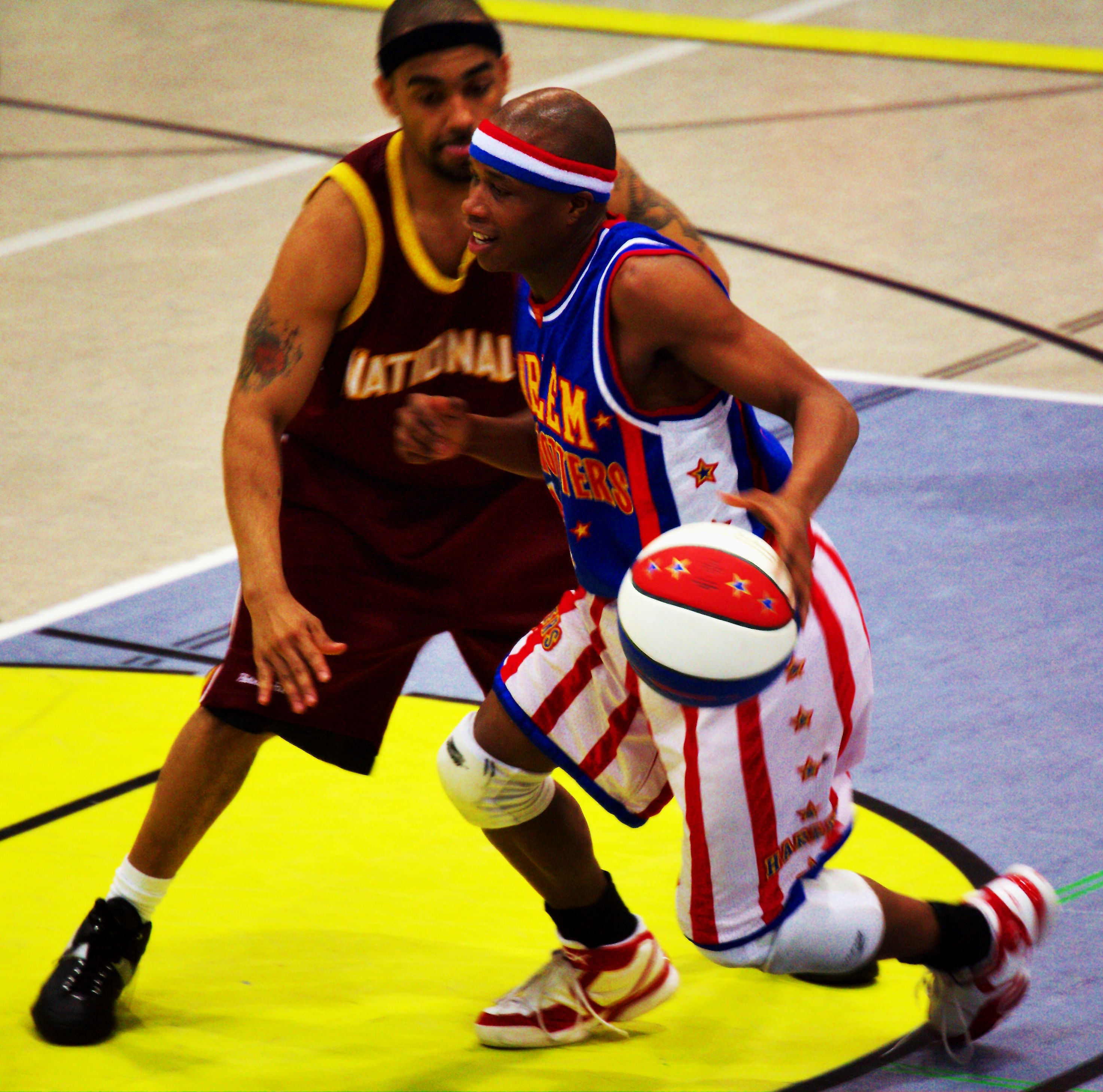 Basketball game